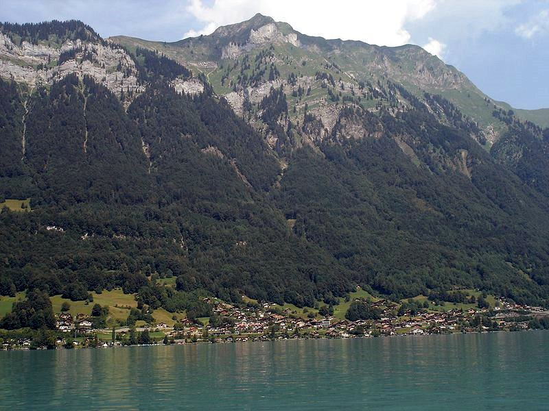 Niederried am Brienzersee